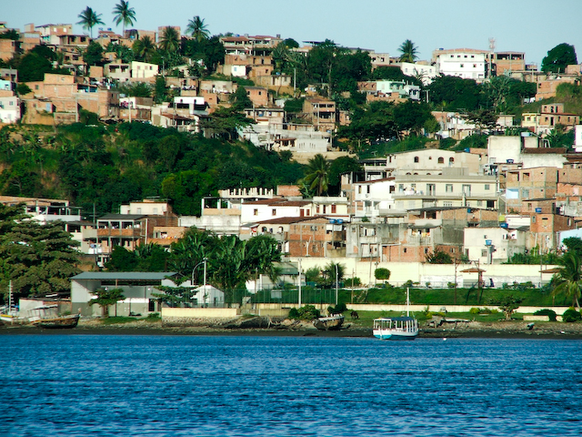 A praia da Ribeira (ou da Penha), Salvador, Bahia, Brasil.